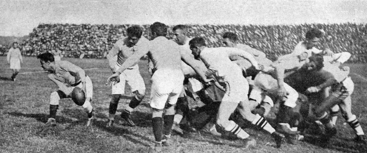 Défaite des Californiens face à la France au stade de Colombes, le 10 octobre 1920 (Struxiano a le ballon).